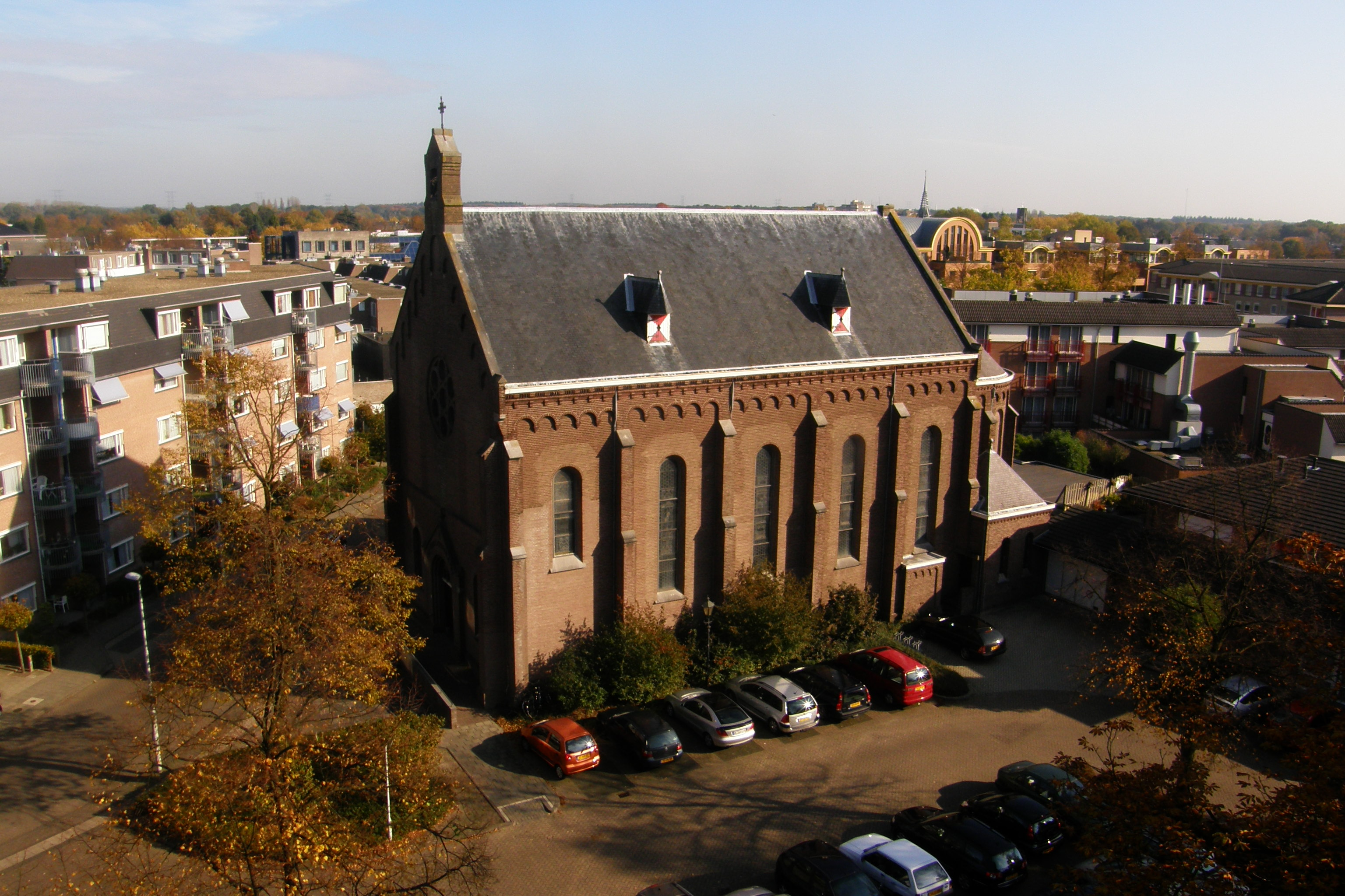 Best, Nazarethstraat 10 - Nazareth of St. Odulphuskapel - anno 1922